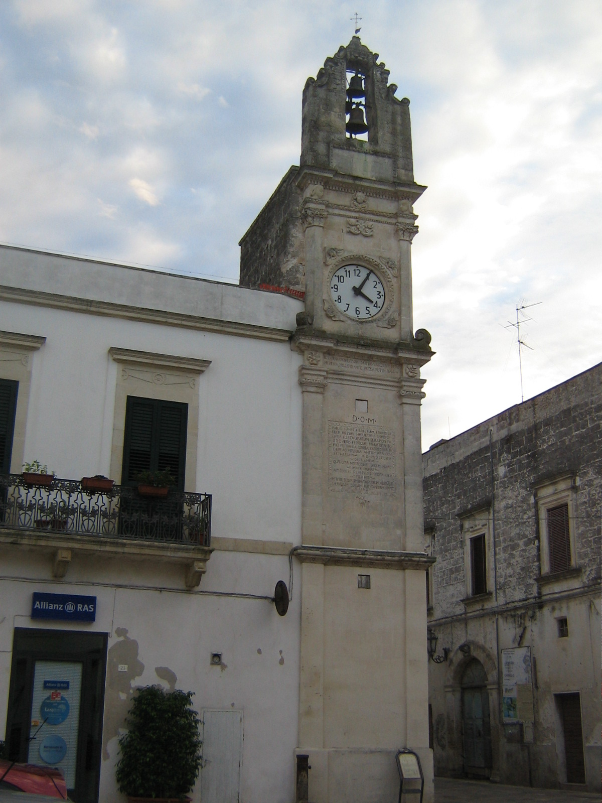 Torre dell'Orologio Corigliano d'Otranto